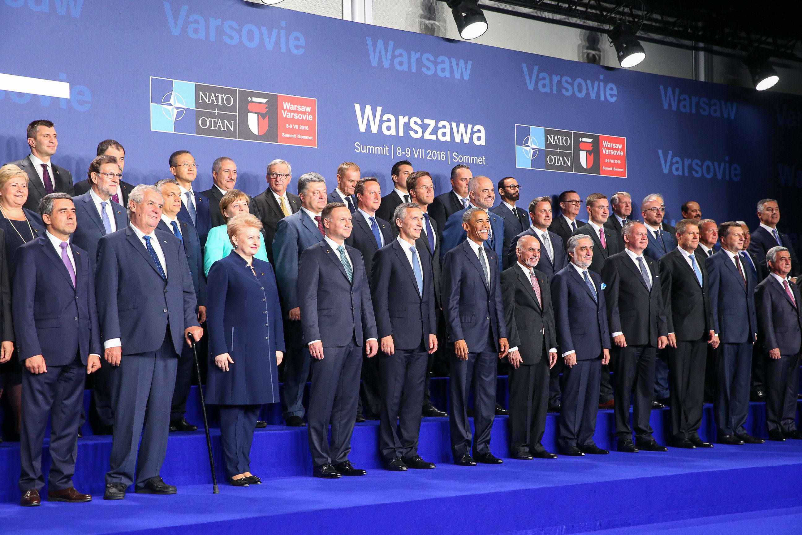 08/07/2016/ Family Photo podczas szczytu NATO w Warszawie. Fot. Andrzej Hrechorowicz